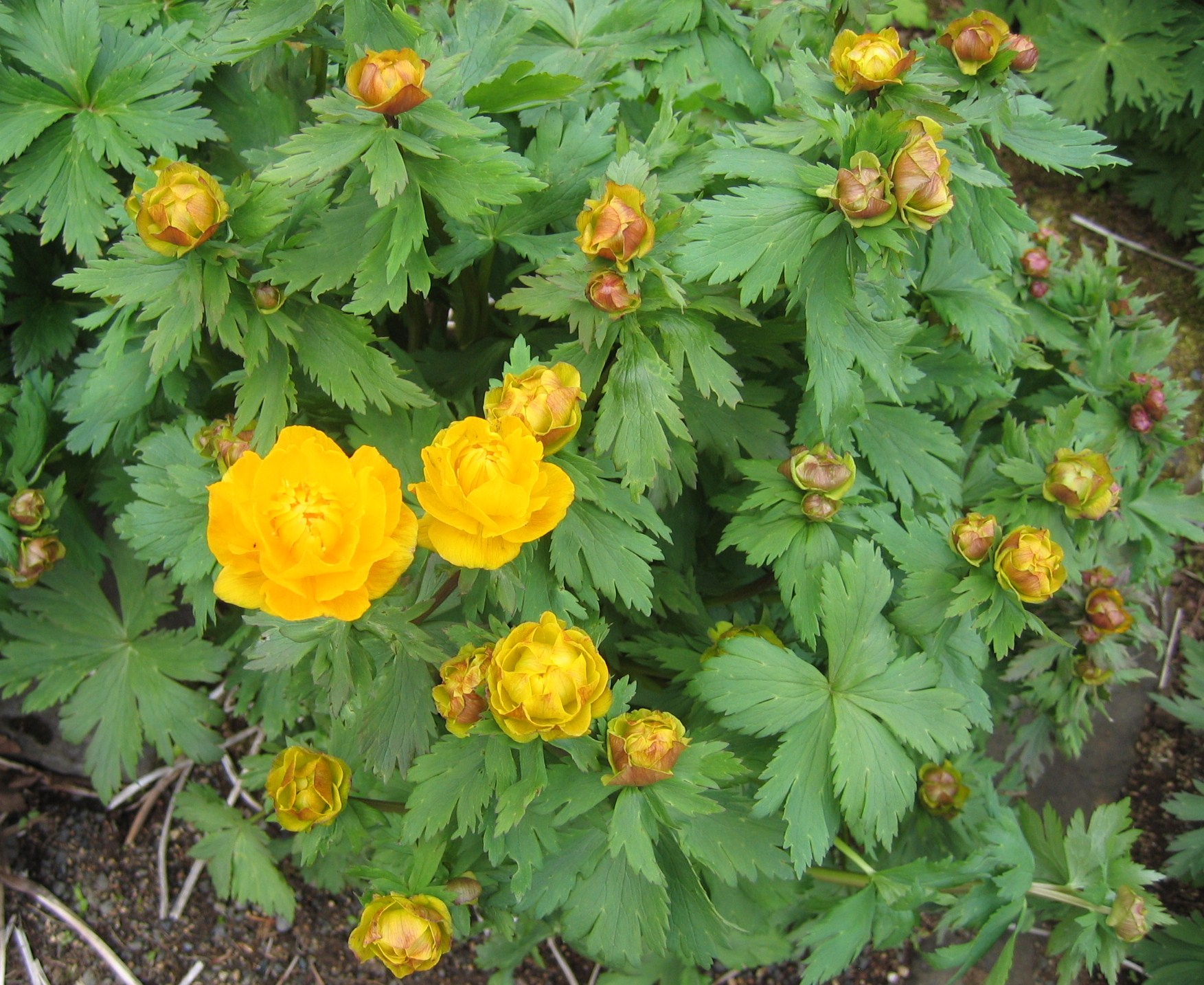 photo taken by Salvör in Grasagarður Reykjavíkur Botanical garden in Reykjavik, Iceland.